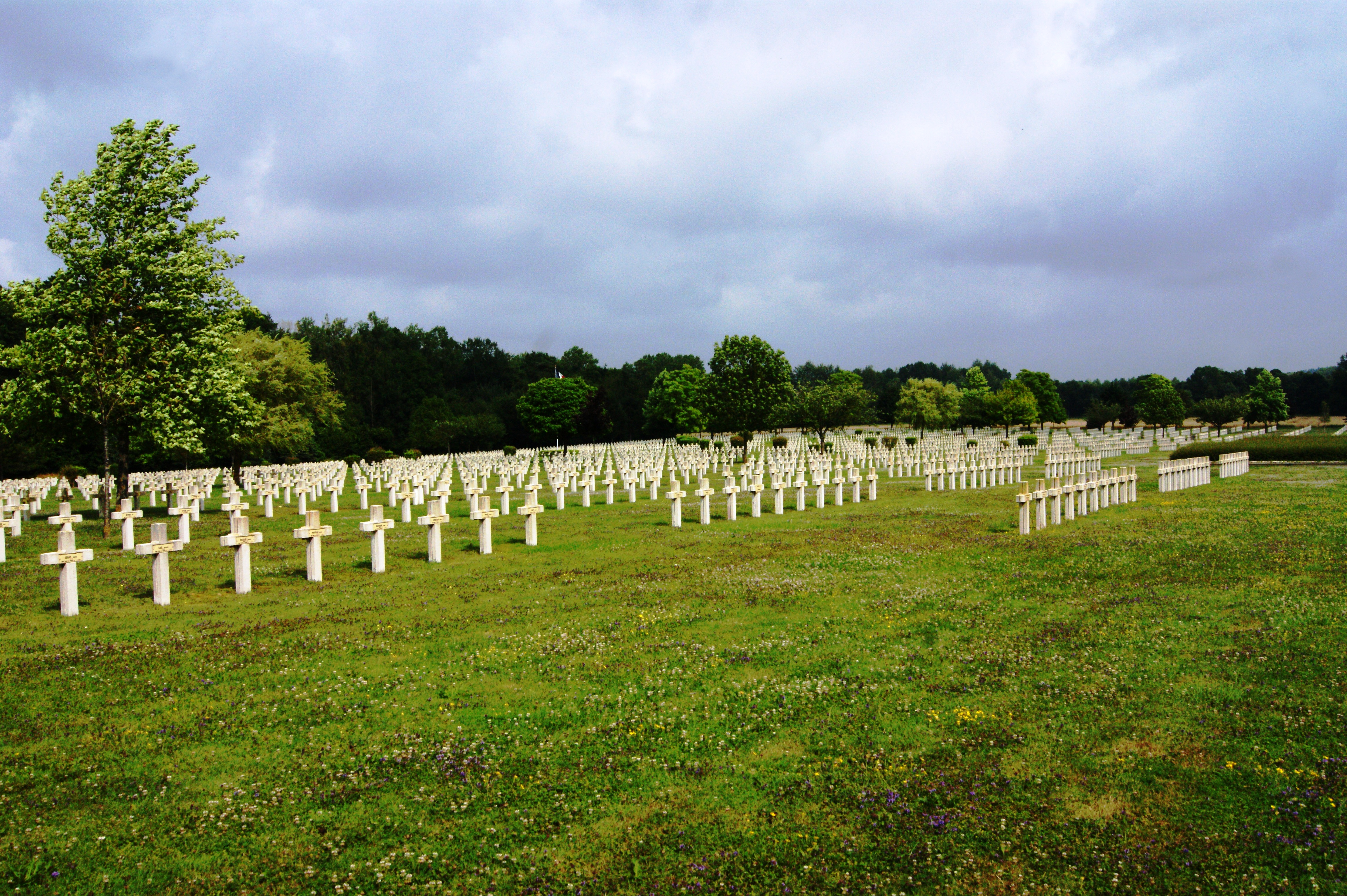 Nécropole Nationale de Minaucourt-le-Mesnil-lès-Hurlus